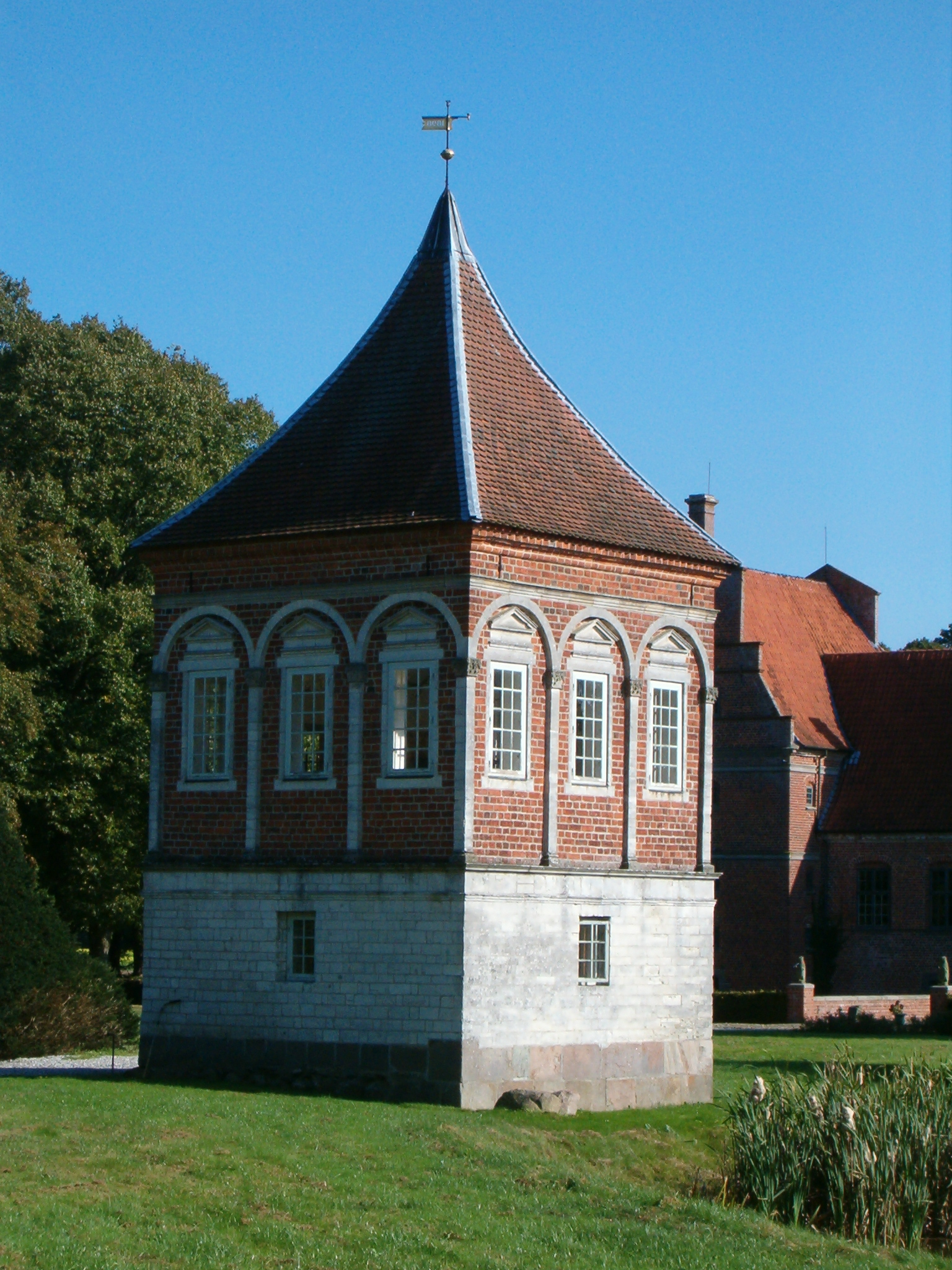 Lysthuset Pirkentavl i Parken ved Rosenholm